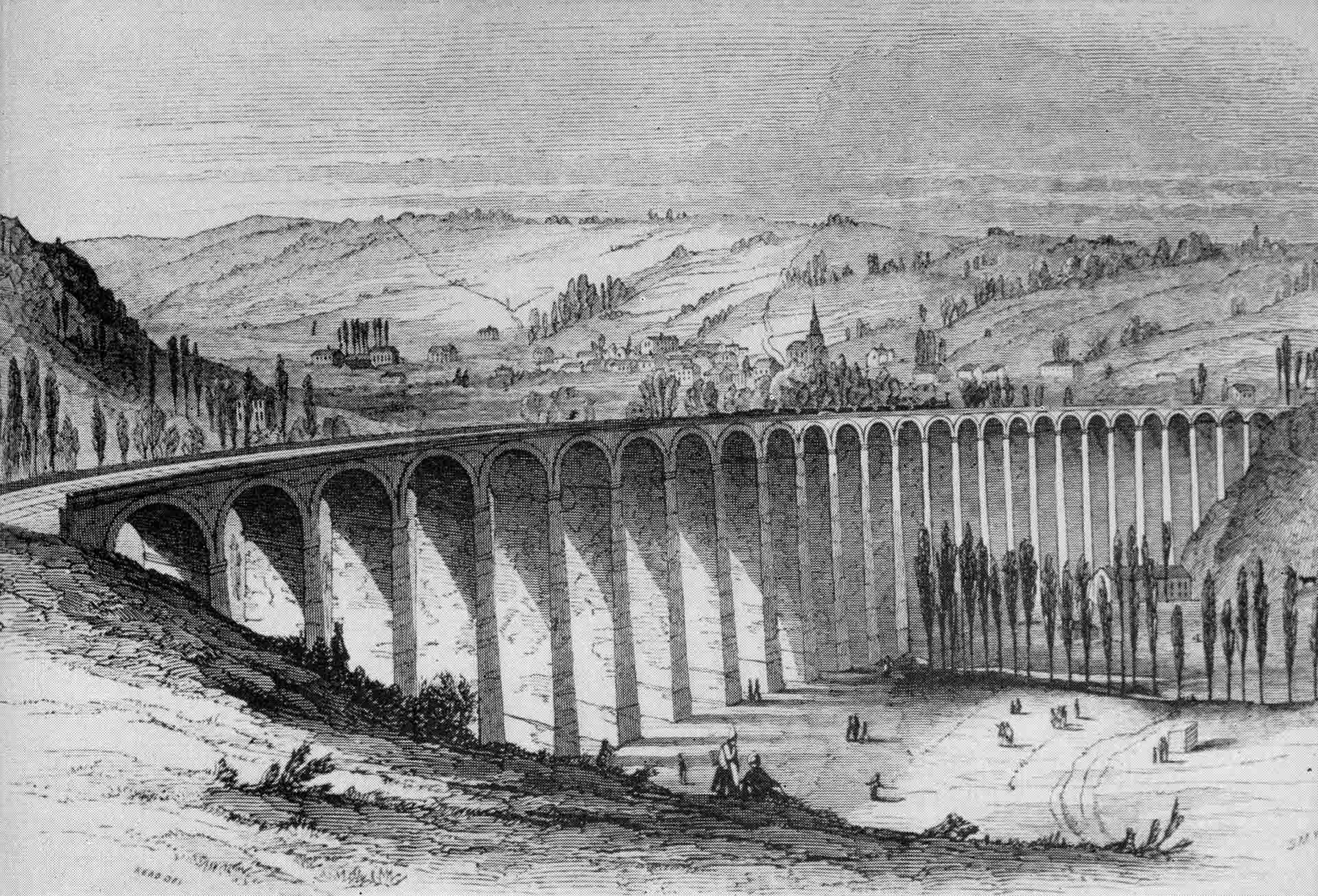 Engraving